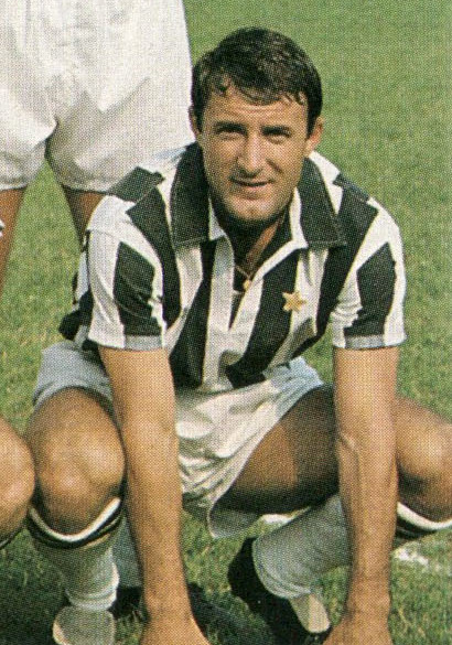 Biella, stadio Lamarmora, 21 agosto 1966. Il calciatore della Juventus, Giampaolo Menichelli, in occasione della vittoriosa amichevole precampionato contro il Biella (3-0).